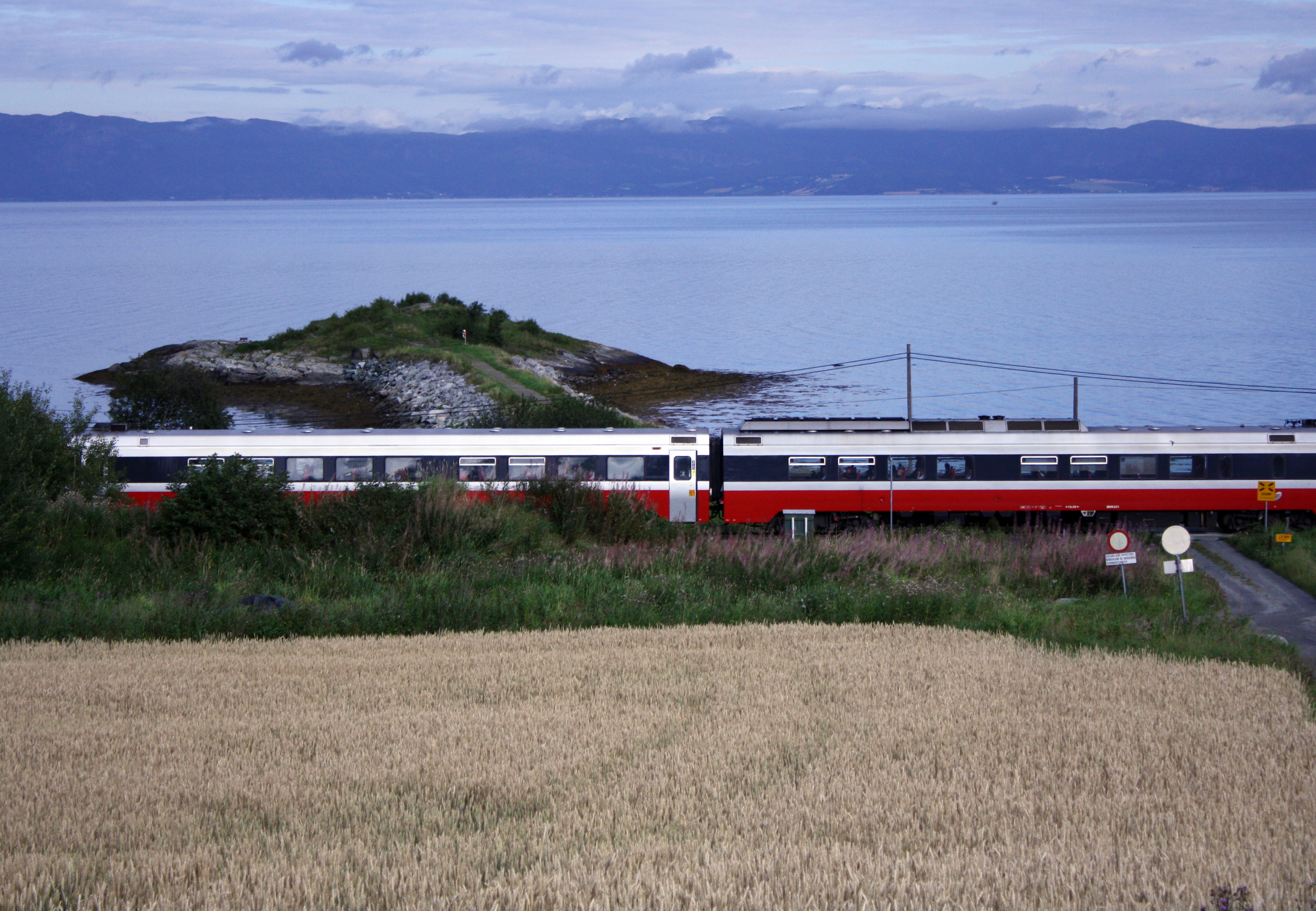 Togtrafikk forbi Være.